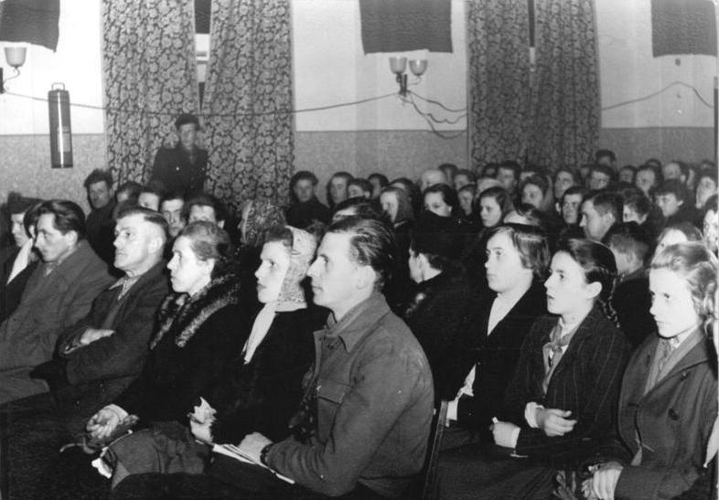 Seelow, "Filmfesttage auf dem Lande Frühjahr 1954" Zentralbild Funck 16.3.1954 "Filmfesttage auf dem Lande Frühjahr 1954" haben begonnen Im Oderbruchkreis Seelow (Bez. Frankfurt-Oder) begannen mit der Festaufführung des DEFA-Farbfilms "Ernst Thälmann - ein Sohn seiner Klasse" im MTS Kulturhaus Sachsendorf die "Filmfesttage auf dem Lande- Frühjahr 1954". Den Genossenschafts- und werktätigen Einzelbauern, den Landarbeitern und Arbeitern der Betriebe stellten sich in dieser Vorstellung eine Gruppe der Darsteller des Dokumentar-Films vor. UBz: Blick in den Festsaal des MTS Kulturhauses Sachsendorf während der Festaufführung des Films "Ernst Thälmann - ein Sohn seiner Klasse".